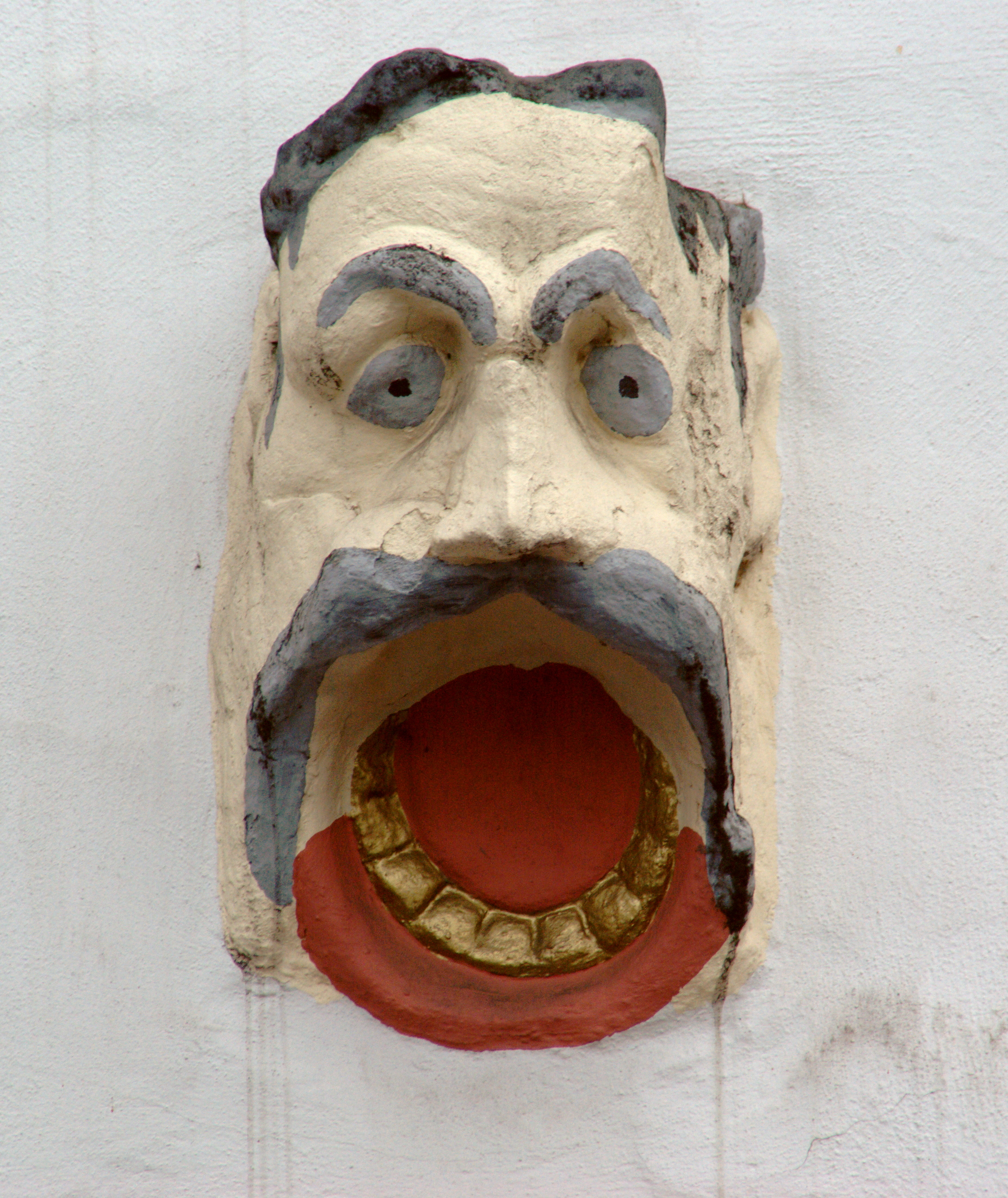 Trier, Simeonstr. 7, "Schrotmaul"